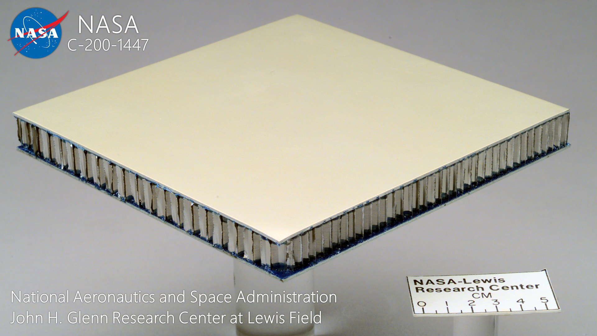 NASA C-200-1447